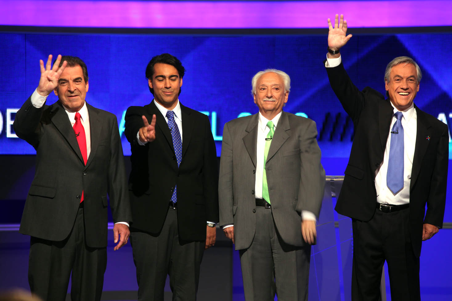 Eduardo Frei participó del Debate Presidencial emitido por todos los canales de televisión.